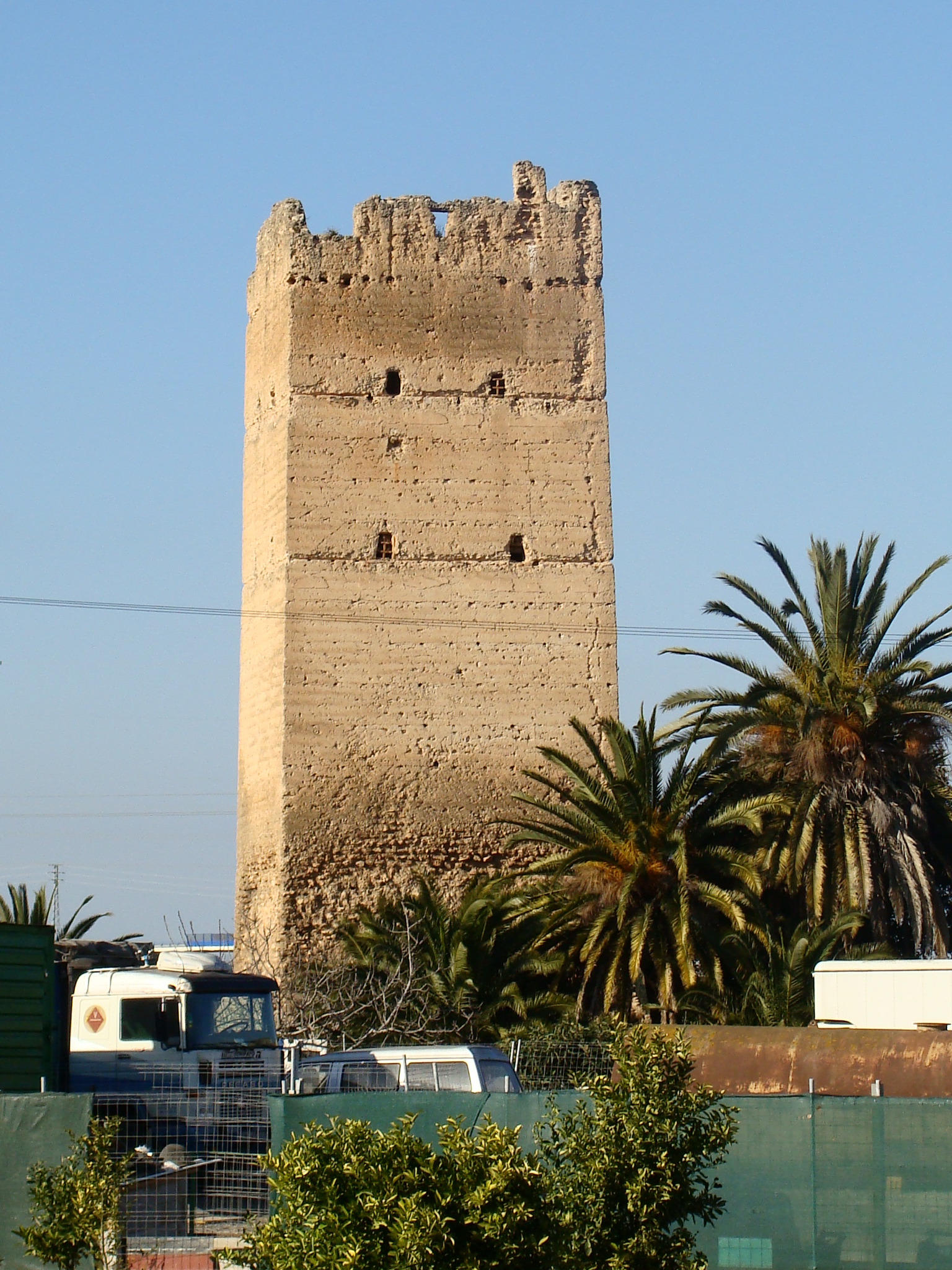 Torre de Mussa a Benifaió (2008).